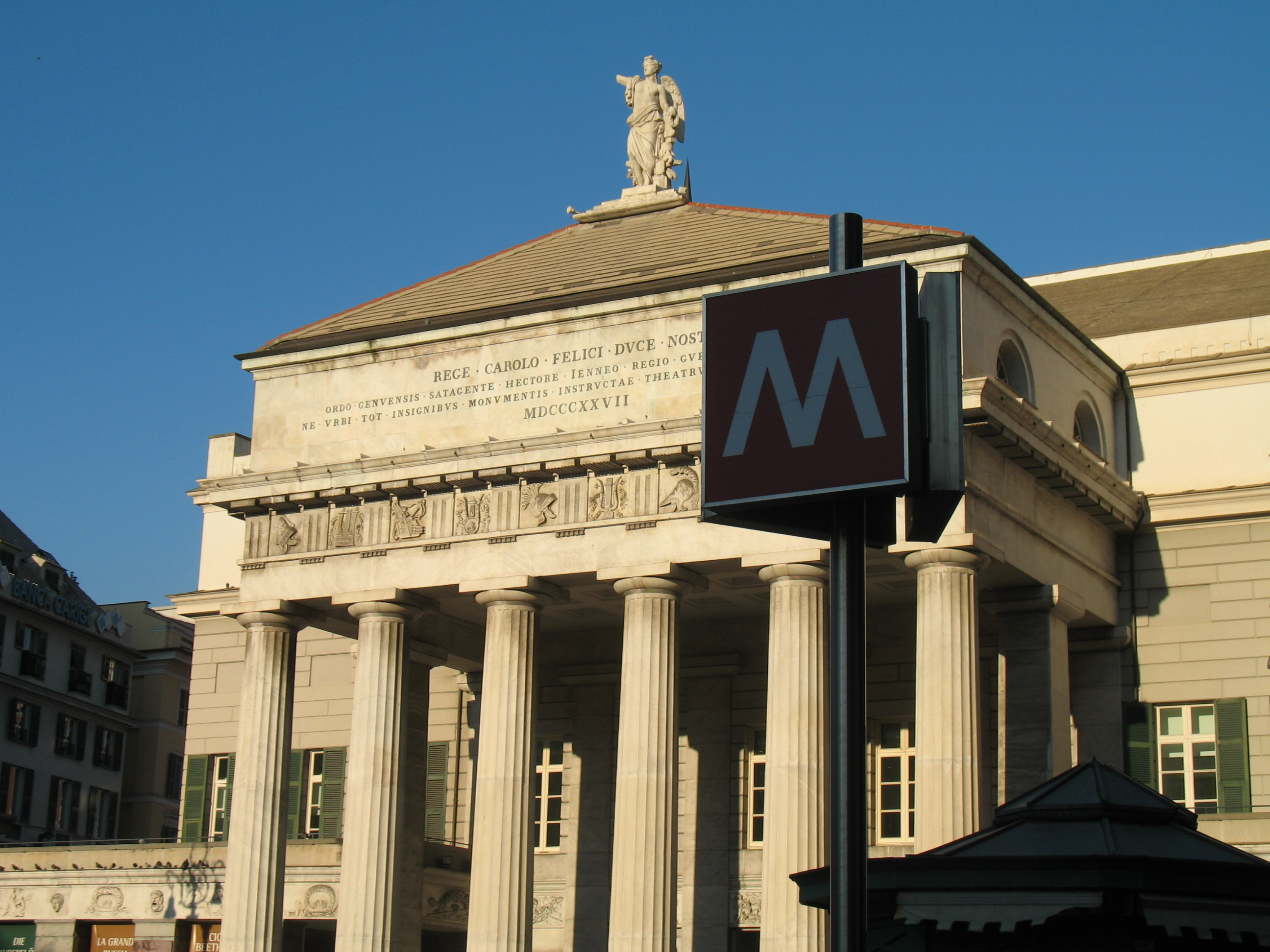 Piazza De Ferrari (Genova), Teatro Carlo Felice, fermata della metropolitana